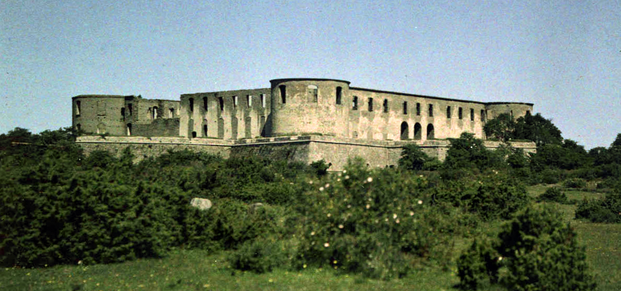 depicted place: Öland, Slättbo hd, Räpplinge, Borgholms slott (Sverige (SE))